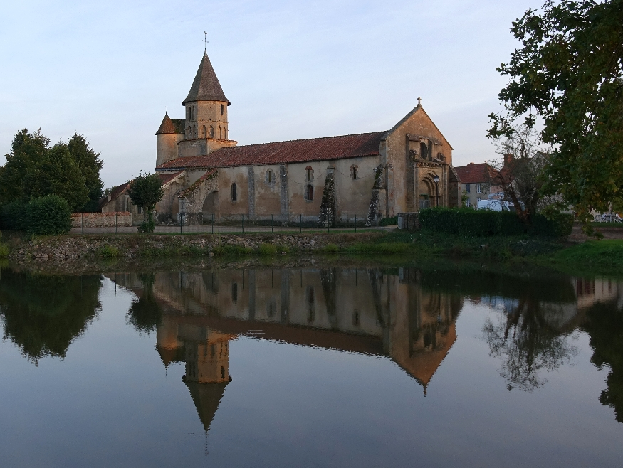 Église Sainte-Anne